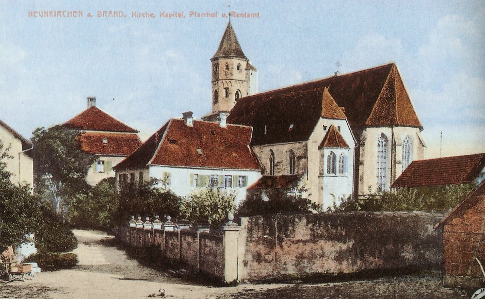 Neunkirchen am Brand. St.-Michaelskirche, Kapitel, Pfarrhof und Rentamt.